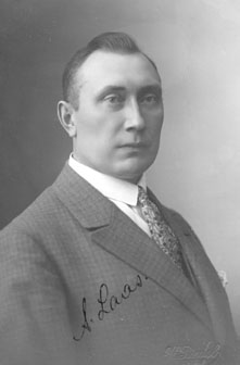 Aleksander Laas